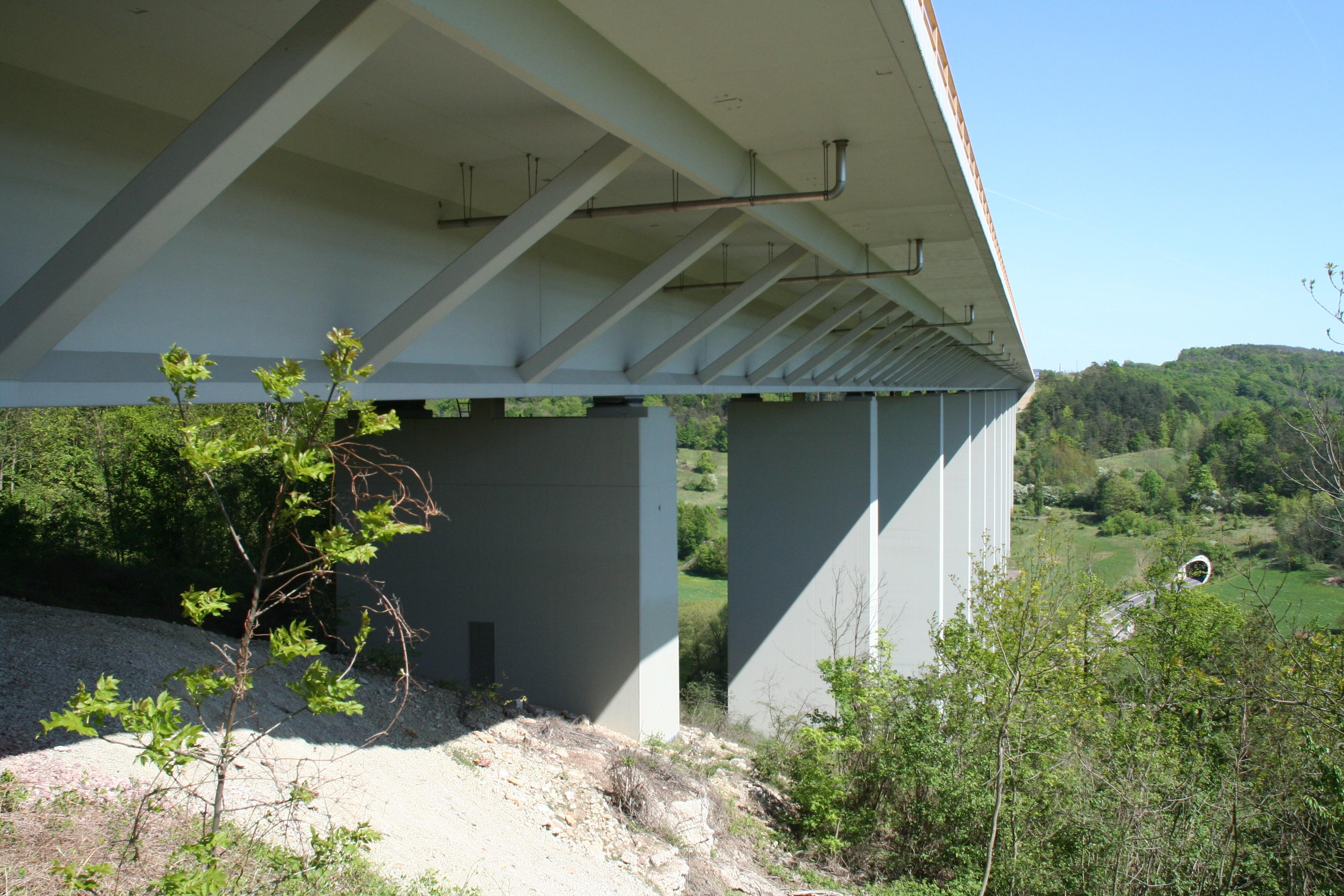 Werratalbrücke HörschelBundesautobahn A4 bei Hörschel, Stadt Eisenach (Anmerkung: Bildname ist irreführend, da die Brücke zur Autobahn A4 und nicht A3 gehört)